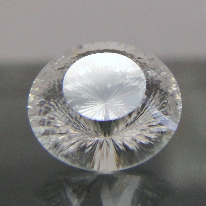 252面カットのディアナサンダイヤモンドです。